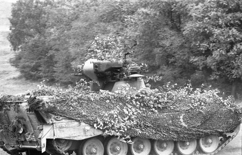 23.9.1986 Mitarbeiter des Bundespresseamtes beobachten das Herbstmanöver "Fränkischer Schild" der Bundeswehr- mit Beteiligung zahlreicher Soldaten aus NATO-Mitgliederstaaten sowie eines französichen Großverbandes- im Raum Würzburg.